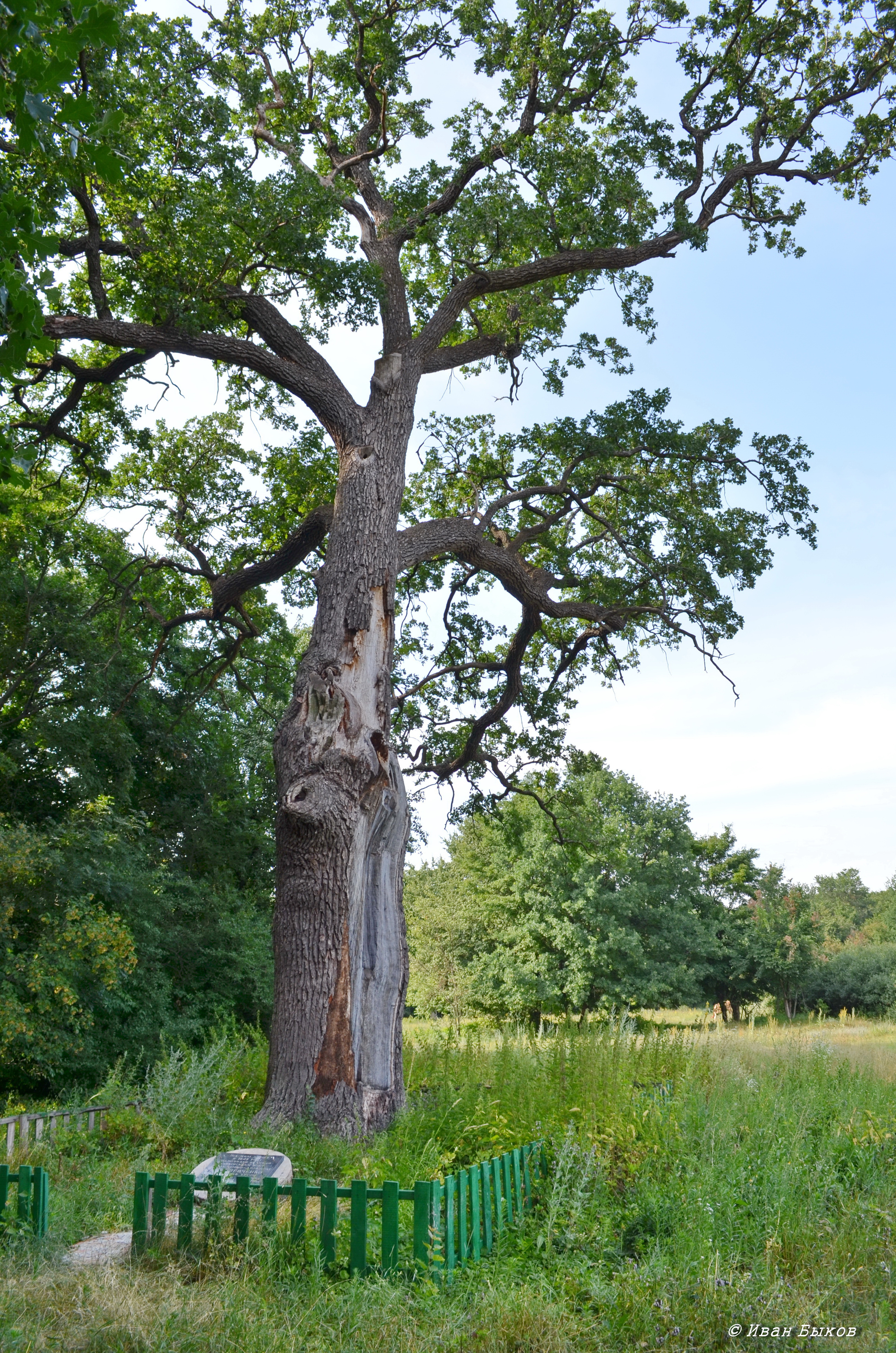 Колишня садиба Лук’яновича, де жив Т.Г.Шевченко в 1845 р.: будинок, комора, дуб, с. Мар’янське